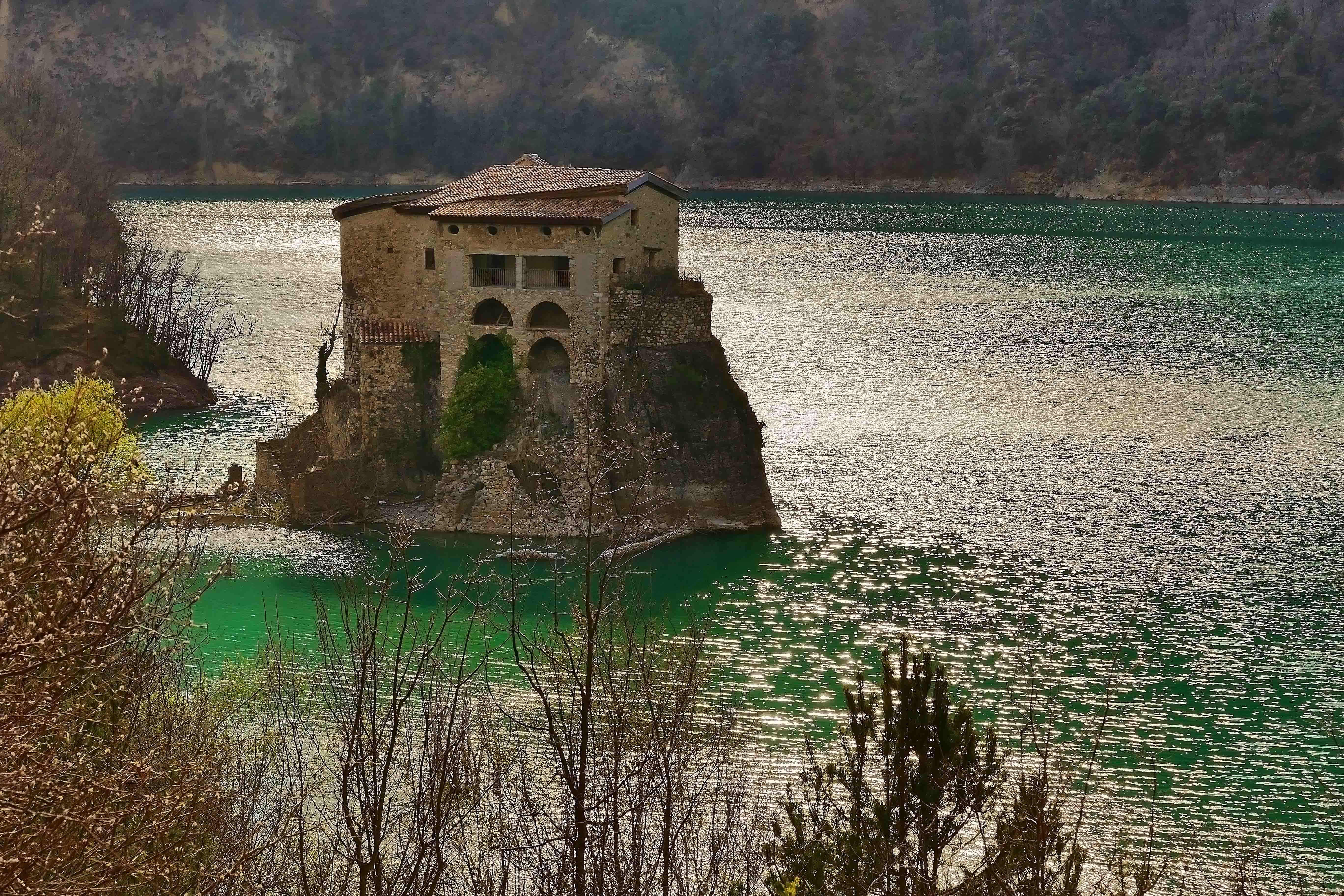 MONESTIR SANT SALVADOR DE LA VEDELLA AL EMBASSAMENT DE LA BAELLS